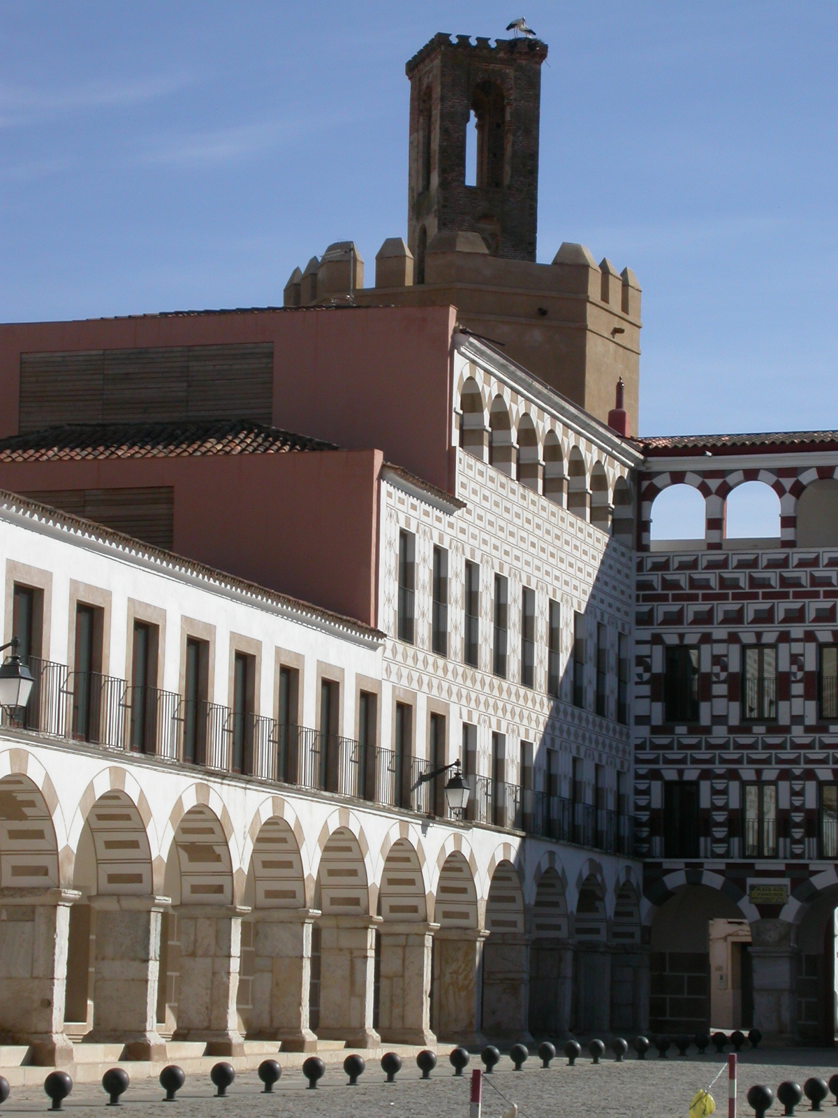 Plaza in Badajoz, Spain